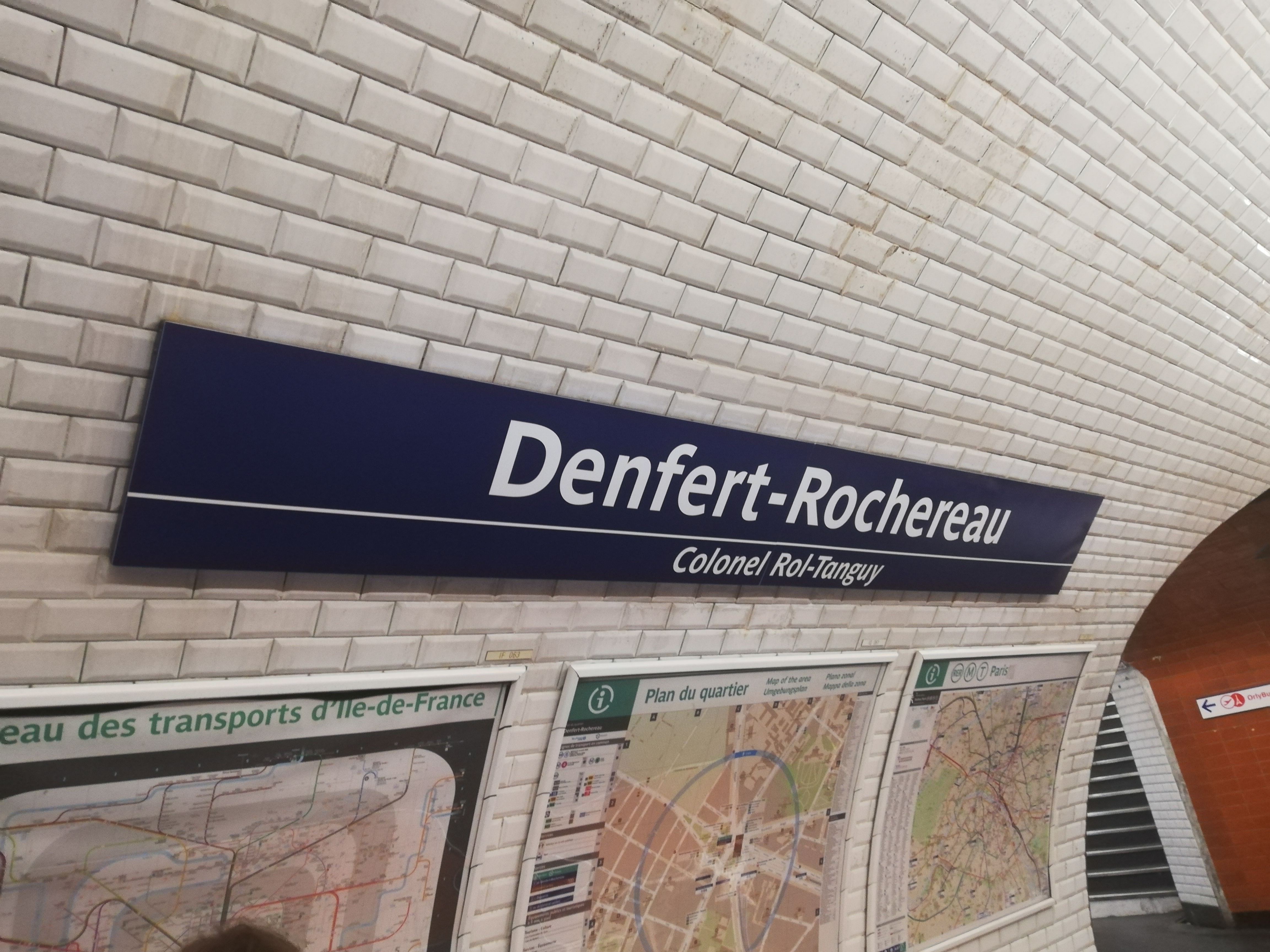 Plaque signalétique de la station de métro Denfert-Rochereau - Colonel Rol-Tanguy de la ligne 6 du métro de Paris, en 2019.